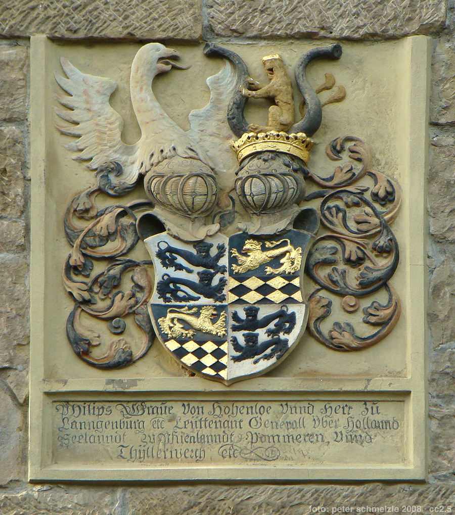 Hohenlohe-Wappenstein in Forchtenberg